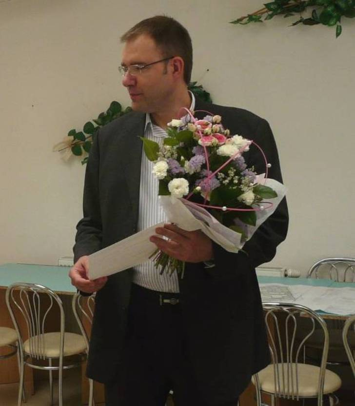 Dyrektor Siwulski